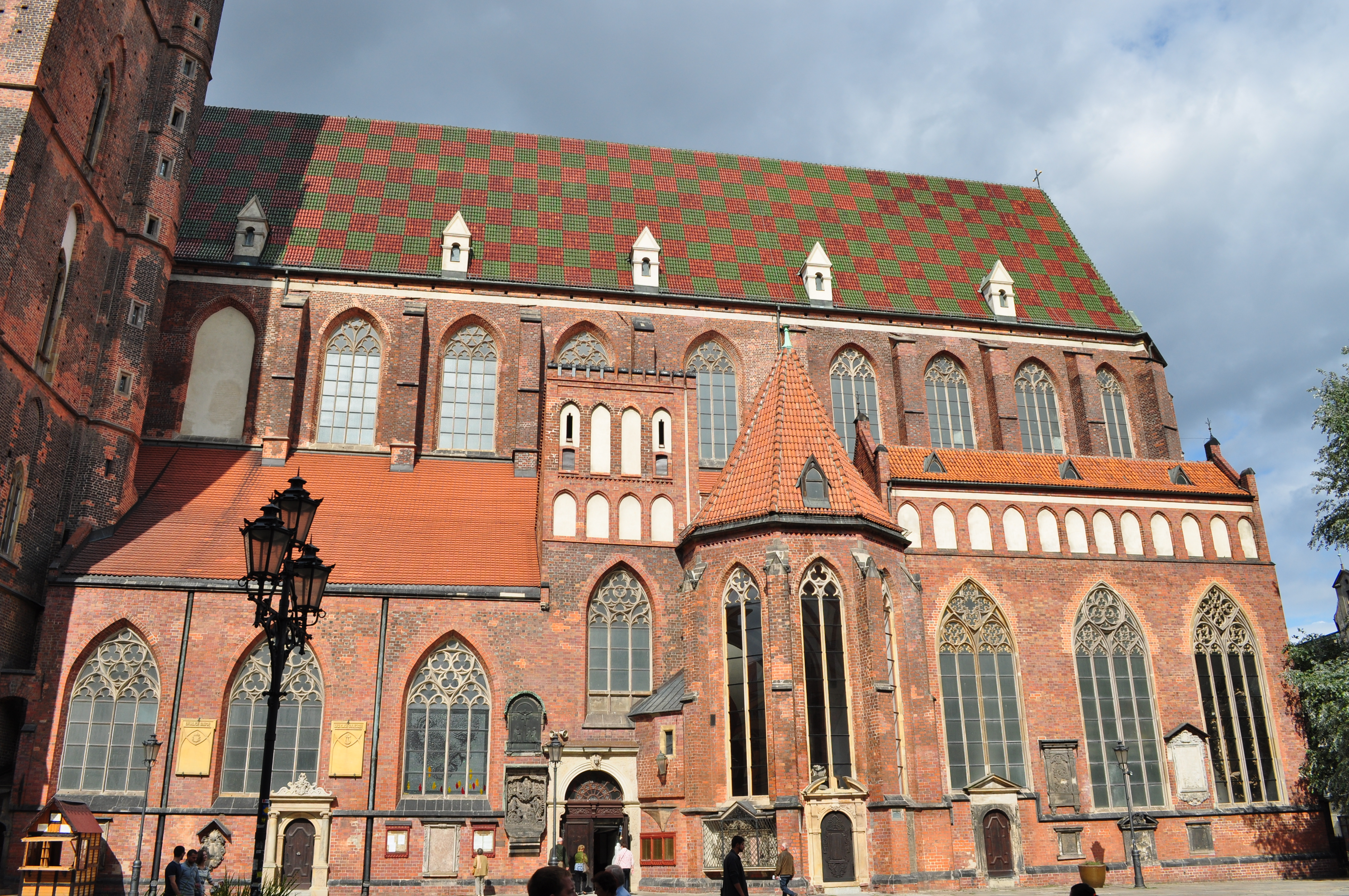 Wrocław Stare Miasto, ul. św. Elżbiety 1 (św. Mikołaja / Odrzańska) - kościół garnizonowy św. Elżbiety, wieża (zabytek nr A/1300/25)